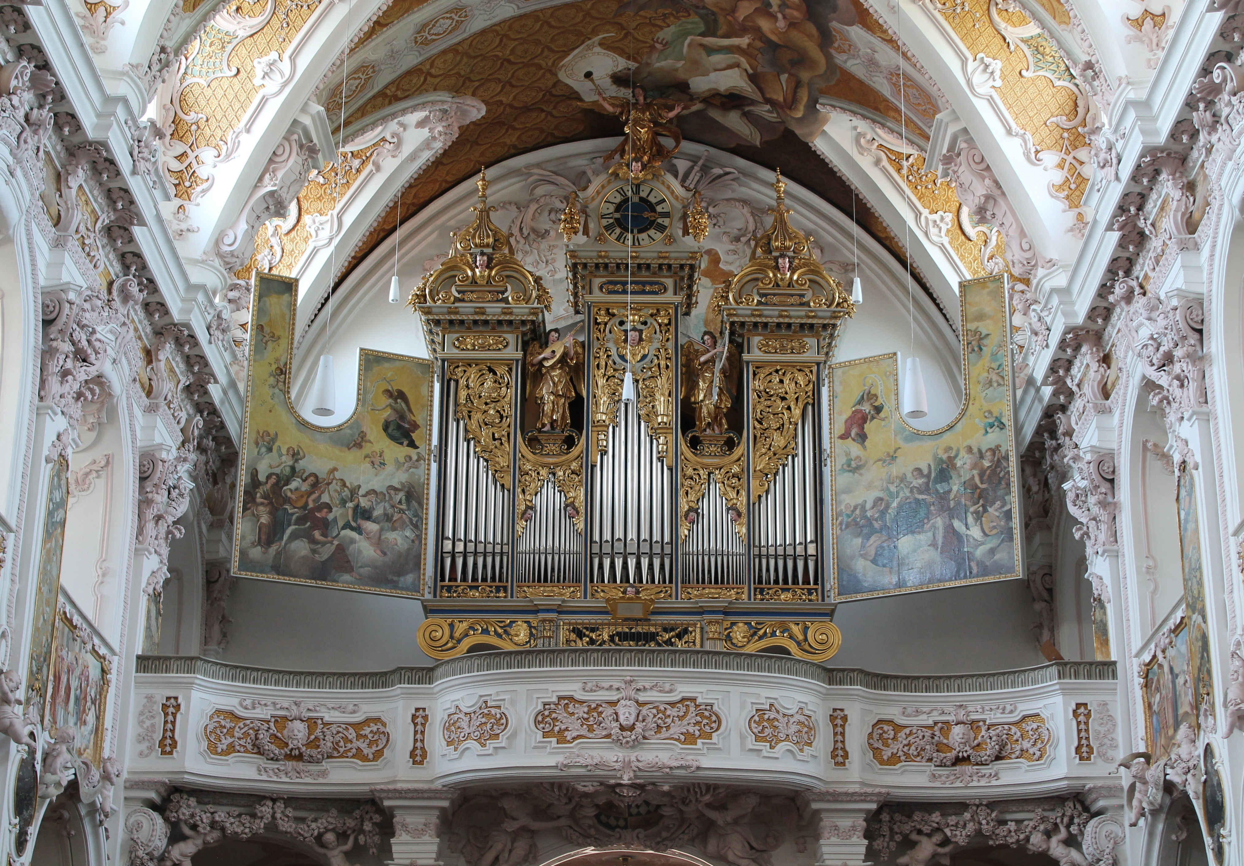 Orgel des Freisinger Doms (1980, W. Albiez, III/52; Gehäuse von C. Egedacher von 1624)